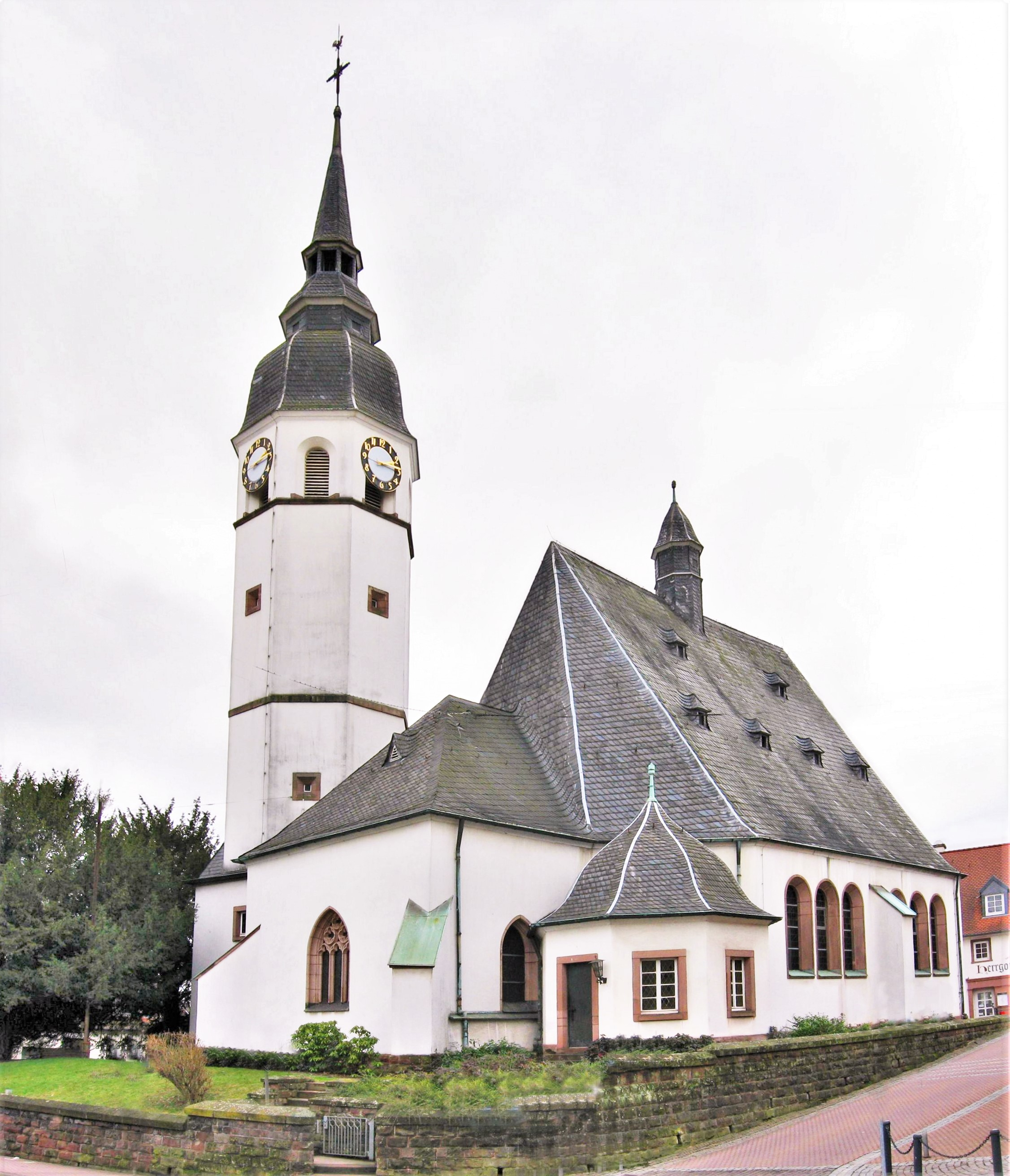 Barocke evangelische Kirche in Heusweiler. Früheste Zeugnisse stammen aus dem 12. Jahrhundert. Die Pfarrei "Husiler" wird 1330 erwähnt. Im Zuge der Reformation wurde die Kirche am 31.10.1575 lutherisch, dokumentiert im Pfarrregister von 1576. Von beiden Konfessionen wurde die Kirche ab 1685 bis zum Neubau der katholischen Kirche (1862) genutzt. Bei der Renovierung 1911 blieb der Chor aus dem 15. Jahrhundert erhalten. Das ursprüngliche barocke Kirchenschiff von 1719 wurde ersetzt. Sakristei und Turm wurden am Chor angefügt. Im klassizistischen Stil wurde der Kircheneingang gestaltet. Der Grabstein des den Neubau vorantreibenden Pfarrers Gustav Weber ist rechts vom Eingang angebracht.